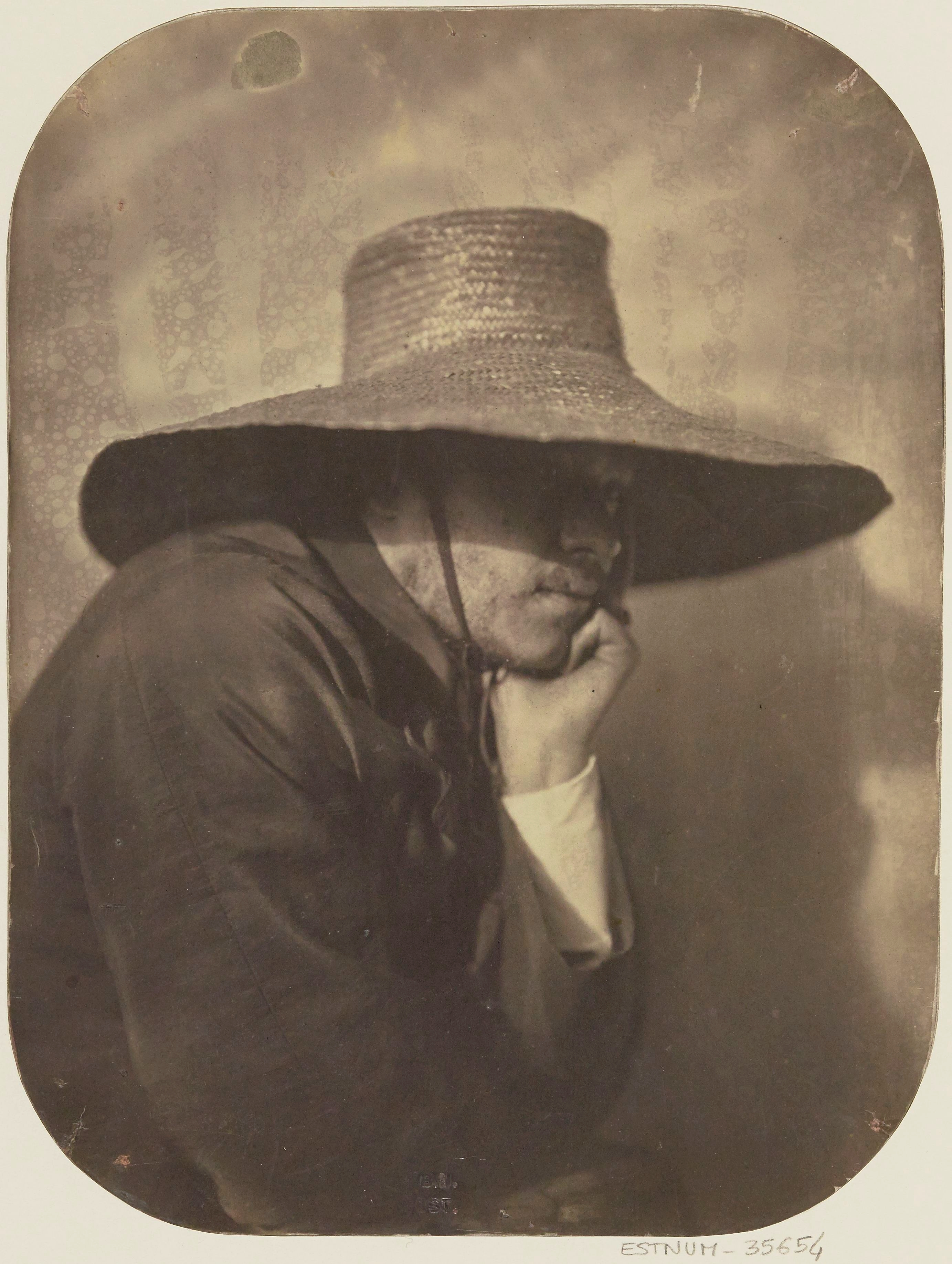 Autoportrait photographique d'Adrien Tournachon (frère de Nadar, peut-être en collaboration avec ce dernier). Papier salé avec couche protectrice d’après un négatif sur verre au collodion, 22,3 × 17 cm. BnF, département des Estampes et de la Photographie, EO-99 (1)-PET FOL